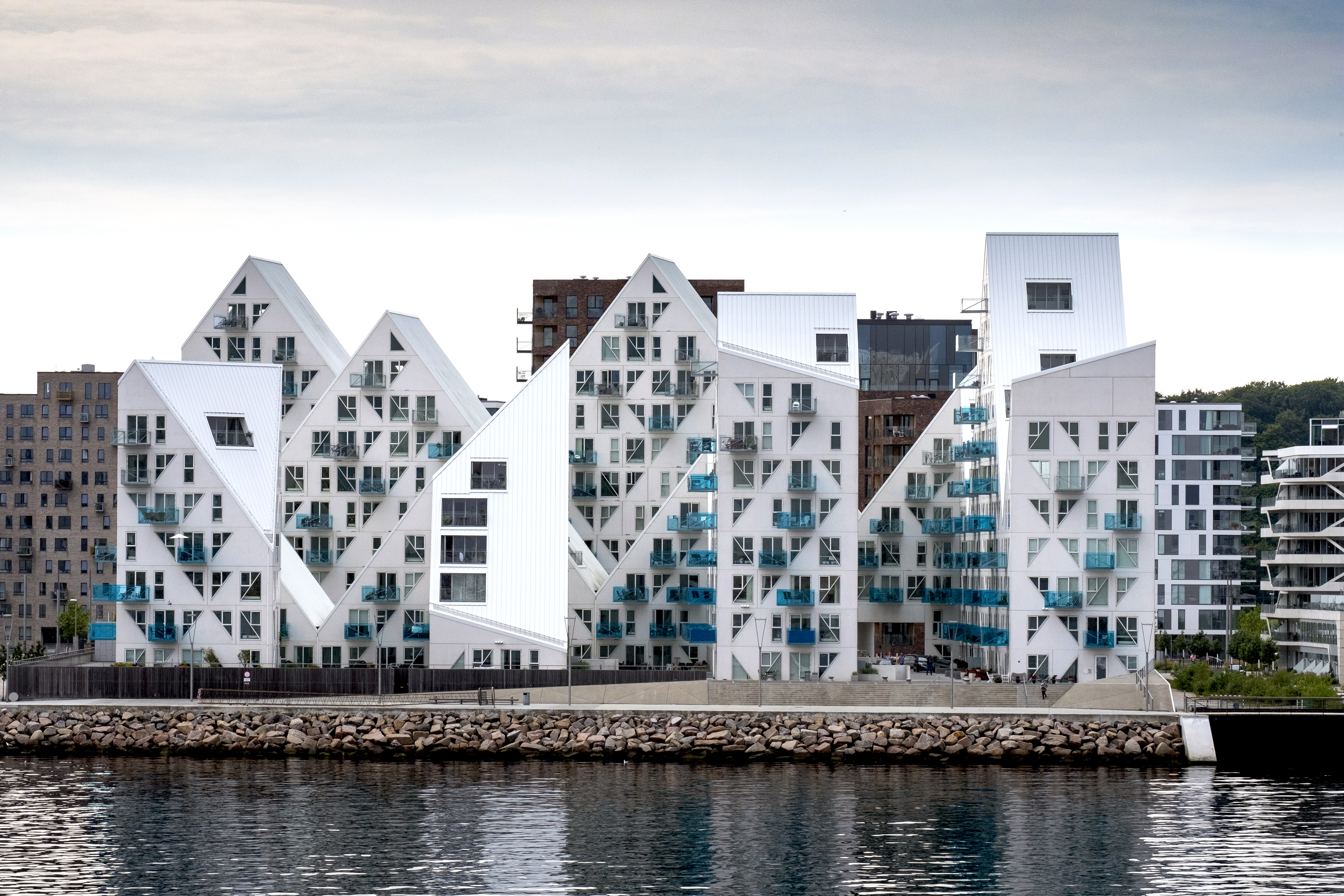 Bostadshusen Isbjerget byggdes av svenska NCC i nya hamnstadsdelen Aarhus Ø. Photo: News Øresund - Johan Wessman. © News Øresund - Johan Wessman (CC BY 3.0). Detta verk av News Øresund är licensierat under en Creative Commons Erkännande 3.0 Unported-licens (CC BY 3.0). Bilden får fritt publiceras under förutsättning att källa anges. .The picture can be used freely under the prerequisite that the source is given. News Øresund, Malmö, Sweden.News Øresund är en oberoende regional nyhetsbyrå som är en del av det oberoende dansk-svenska kunskapscentrat Øresundsinstituttet.